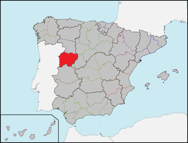 Ubicación de la provincia de Salamanca en la España de los años treinta